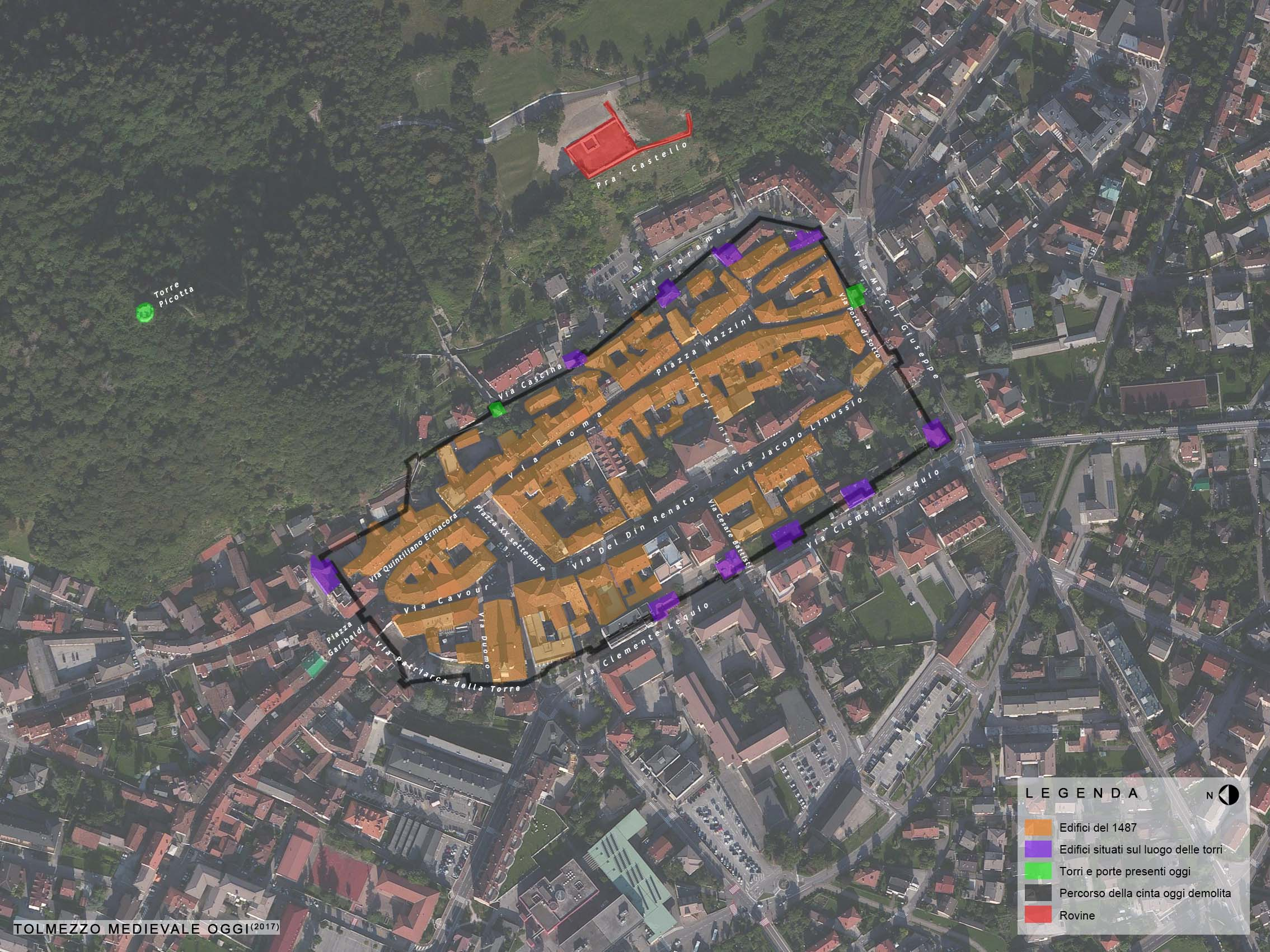 Sovrapposizione della pianta storica di Tolmezzo del 1487 sul fotogramma satellitare della città nel 2017.